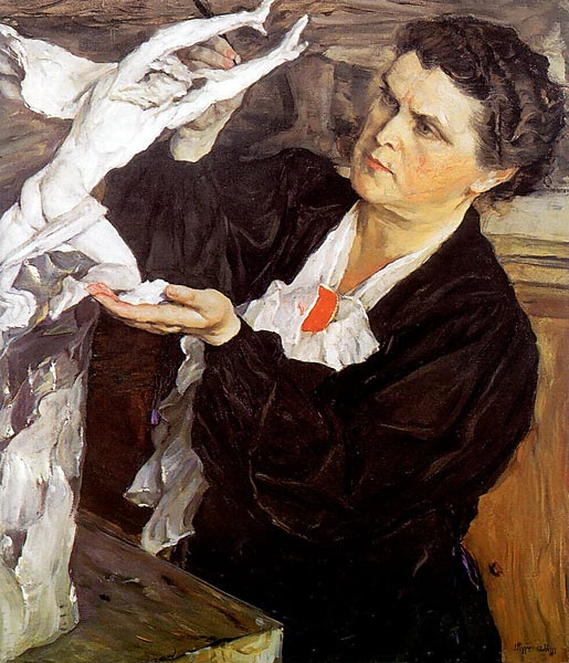 Портрет скульптора В.И. Мухиной. 1940 г. Государственная Третьяковская галерея